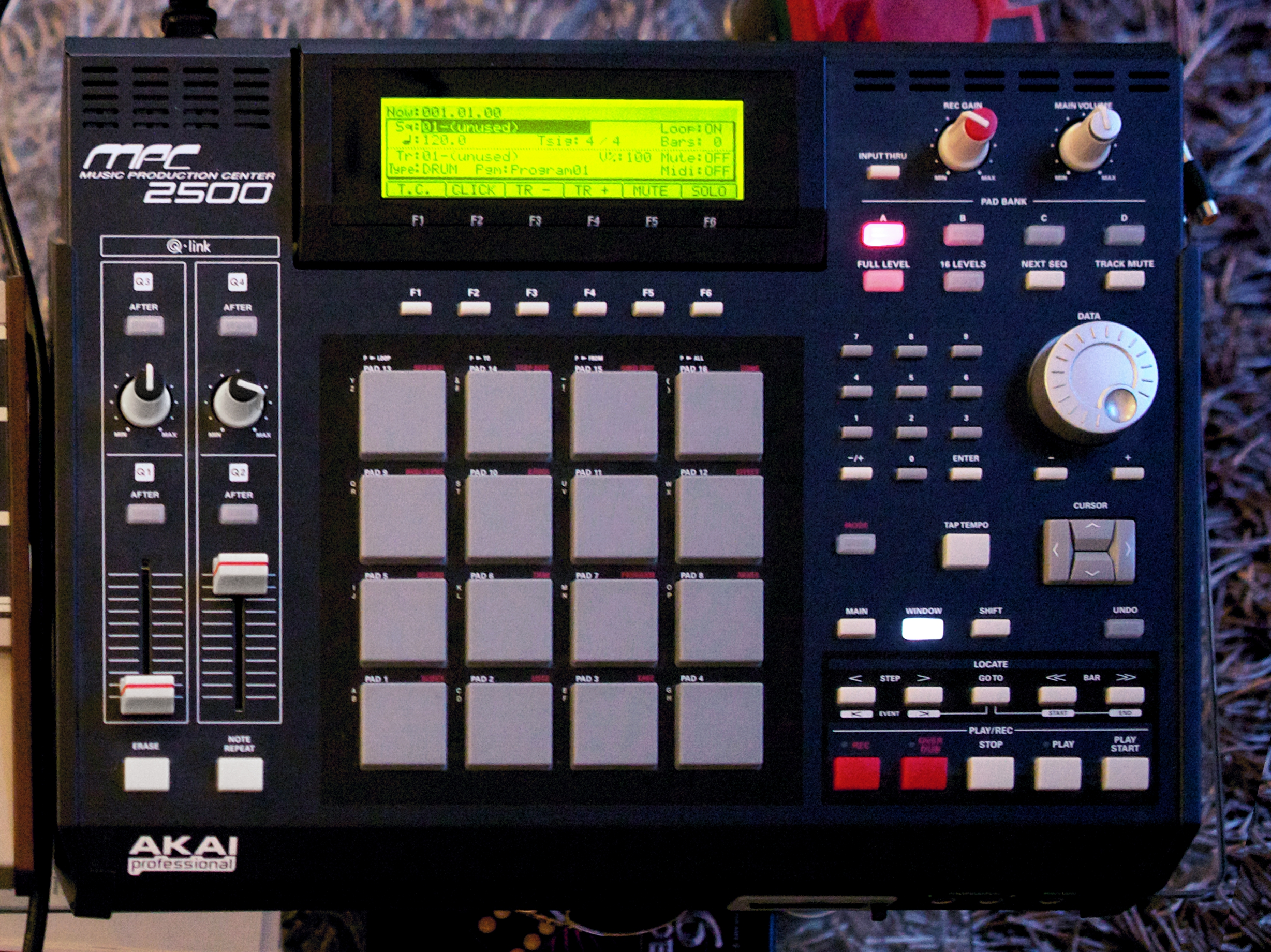 Akai MPC2500 sampler / sequencer / drum machine.